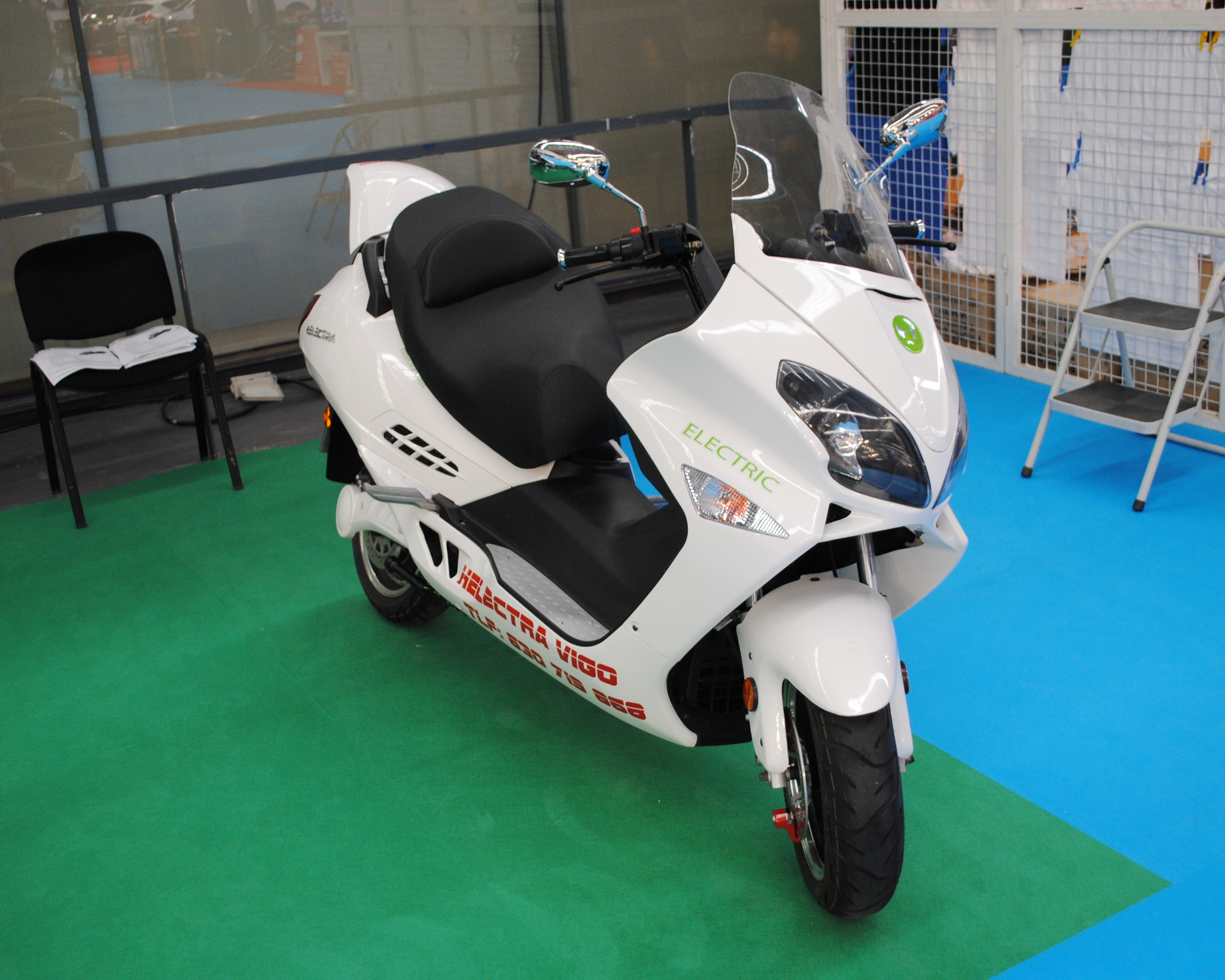 HELECTRA MAXI 5Kw, 2012, IFEVI